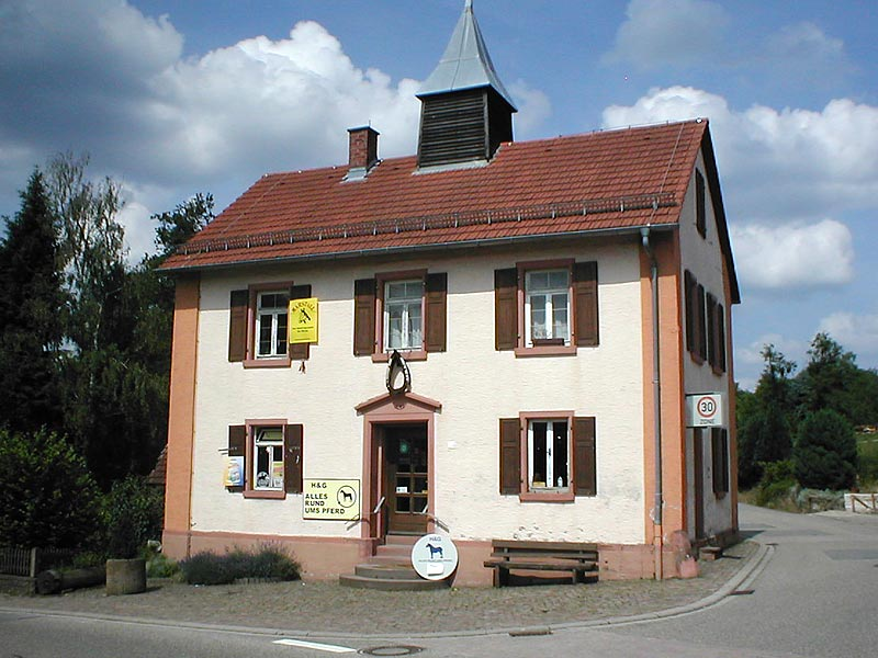 Altes rathaus in Oberschwarzach (odenwald)